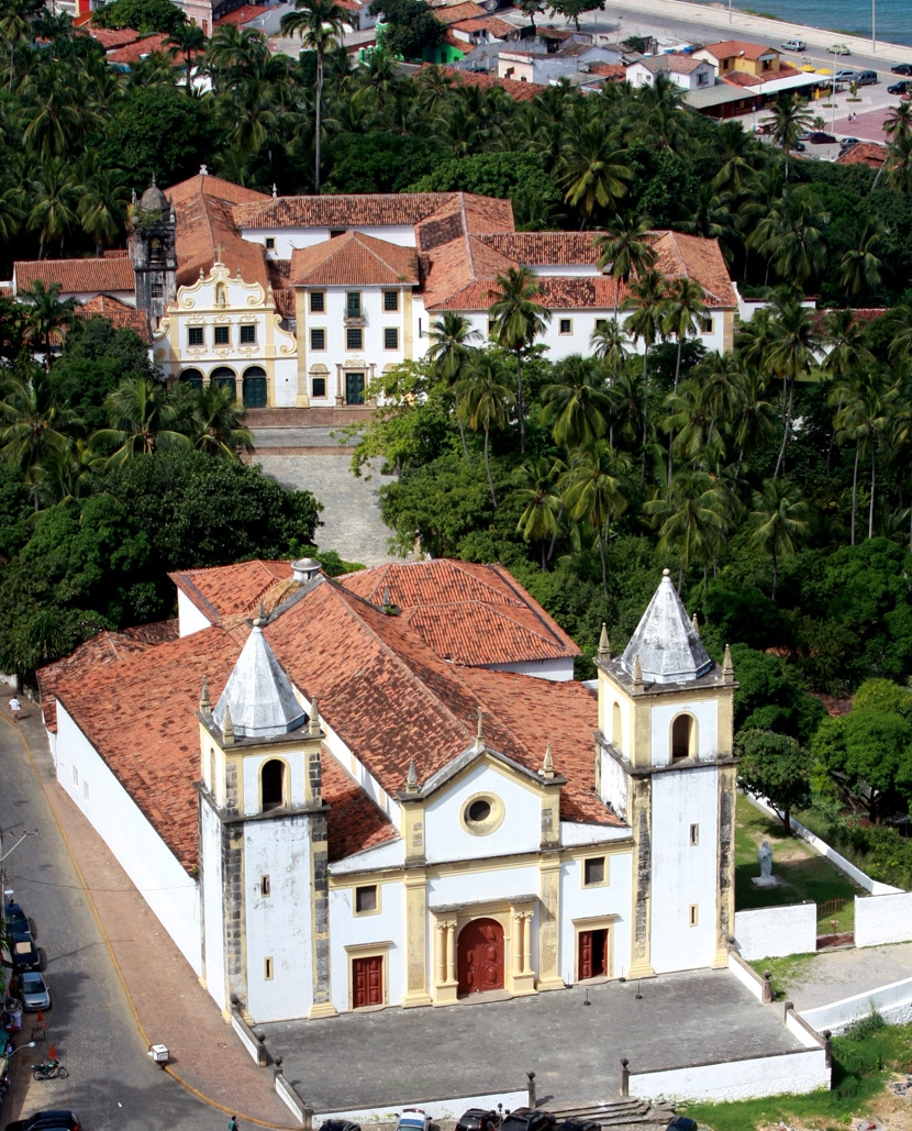 Vista aérea da Igreja da Sé e do Convento de São Francisco - Olinda - Pernambuco - Brasil